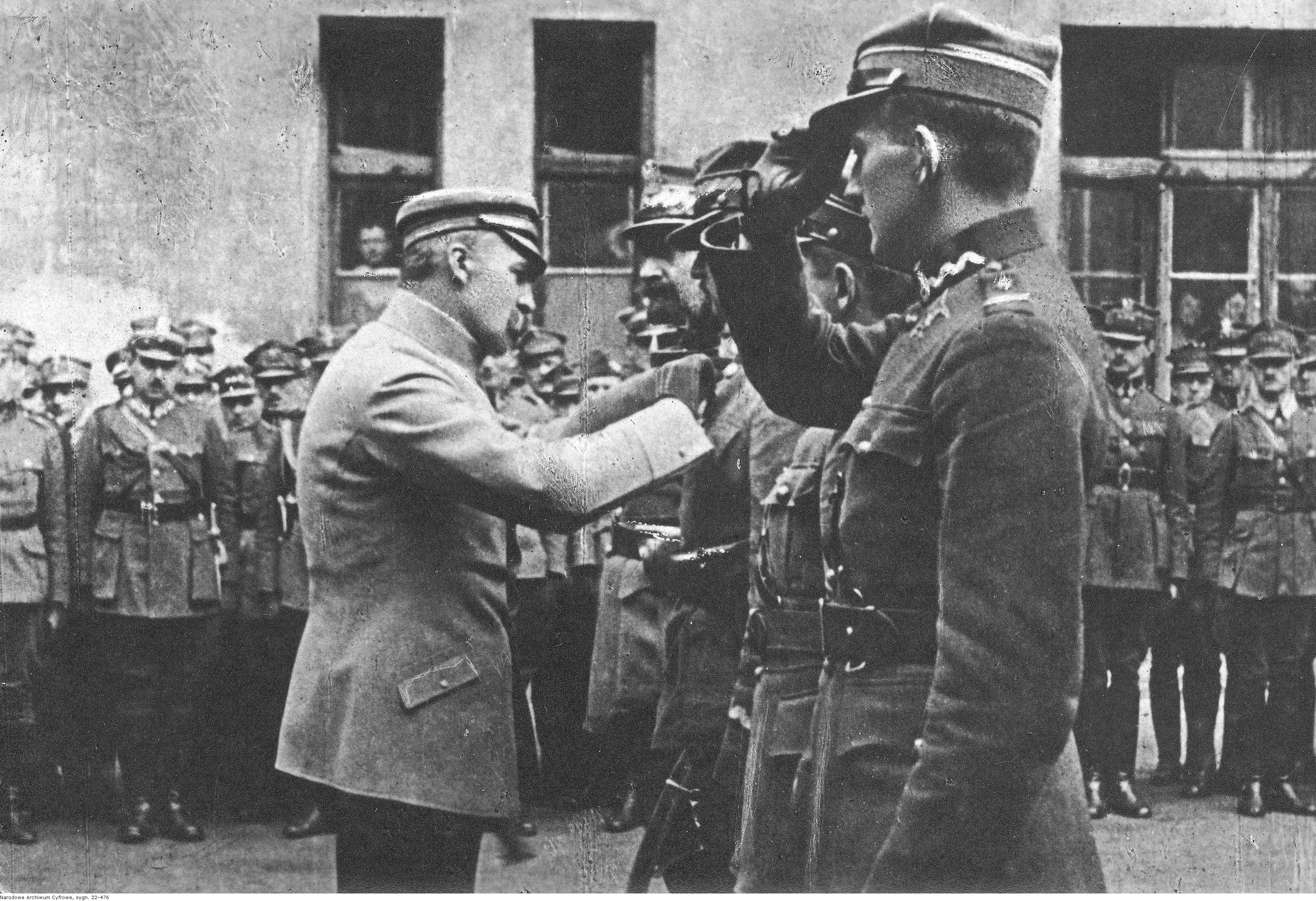 Naczelnik Państwa Józef Piłsudski odznacza oficerów krzyżem Virtuti Militarii V kl. od lewej: gen. Tadeusza Jordan Rozwadowskiego, gen. Stanisława Hallera, płk. Tadeusza Piskora, płk. Cedrica Eralda Fauntleroy'a - dowódcę 7. Eskadry Lotniczej im. T. Kościuszki przed gmachem Sztabu Generalnego WP na pl. Saskim.